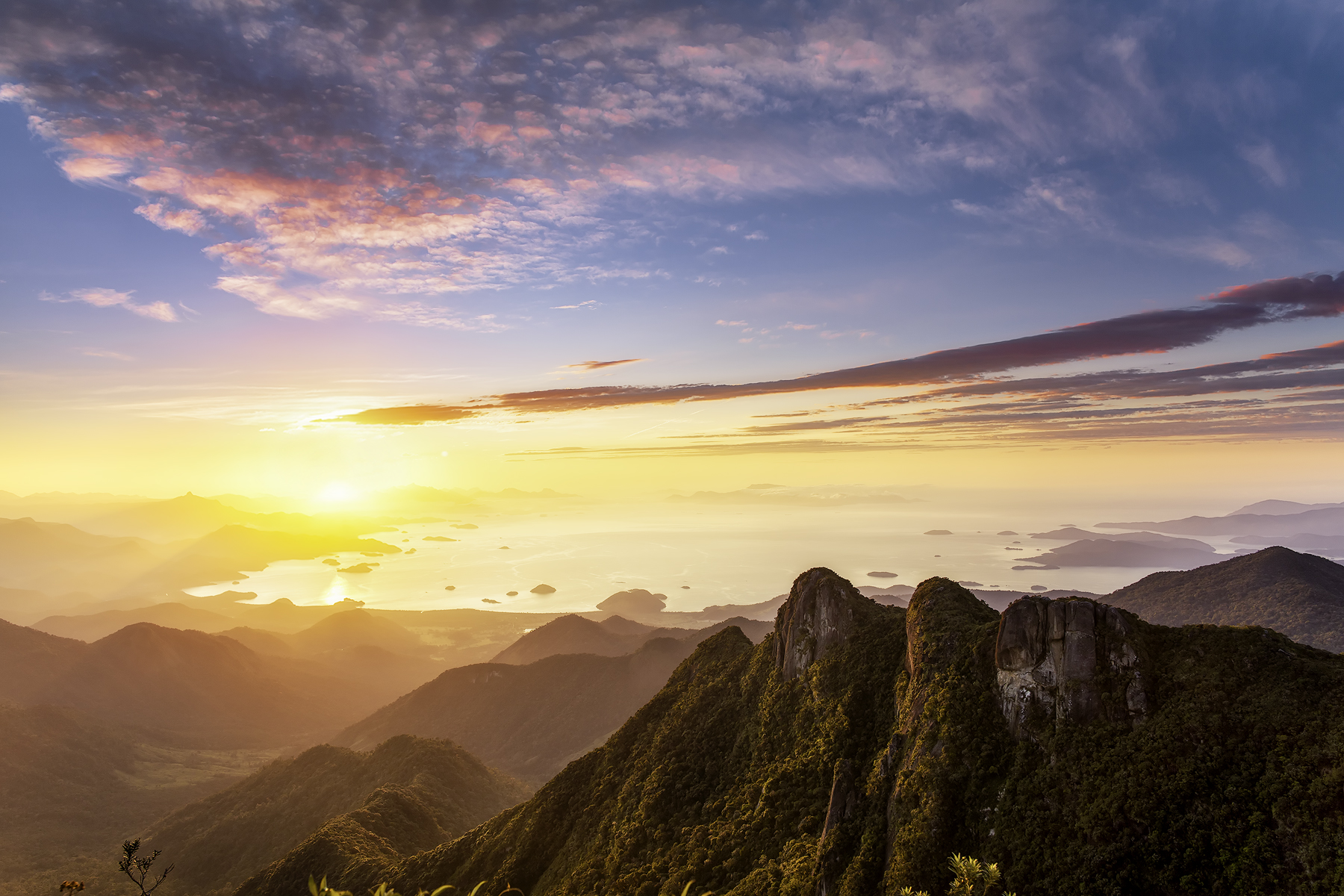 Nascer do sol na Pedra da Macela. Vista para a Baia de Angra dos Reis